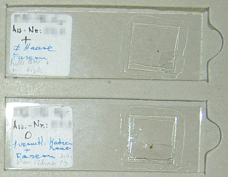 Objektträger mit asservierten Beweisstücken eines (abgeschlossenen) deutschen Kriminalfalles. Unter den Deckgläsern sind Haarproben zu erkennen, die vor der DNA-Anaylse mikroskopisch auf ihre Beschaffenheit untersucht wurden. Die polizeilichen Kennzeichnungen sind unkenntlich gemacht worden. Eigene Aufnahme.